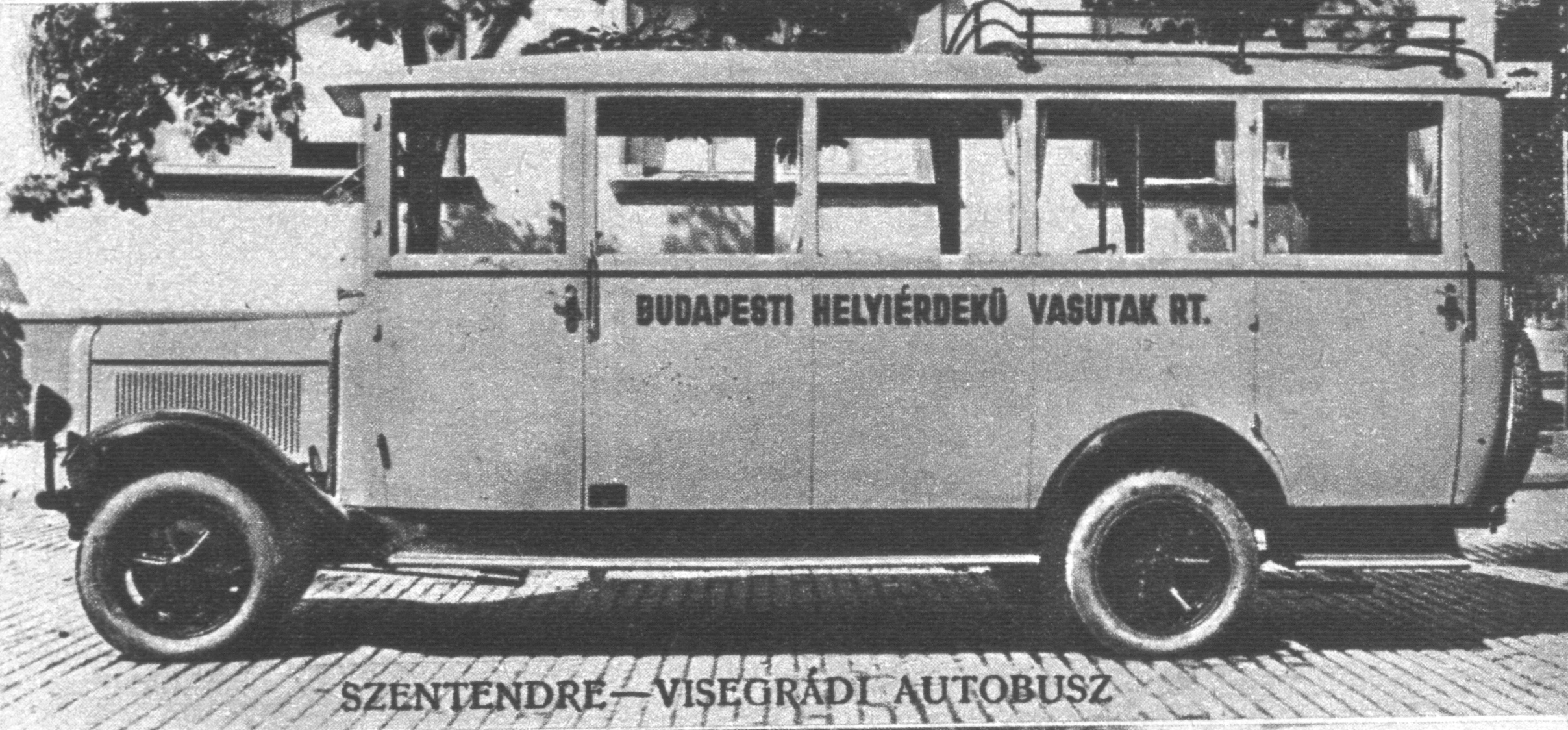 Szentendre-Visegrád Helyi Érdekű Vasút autóbusza